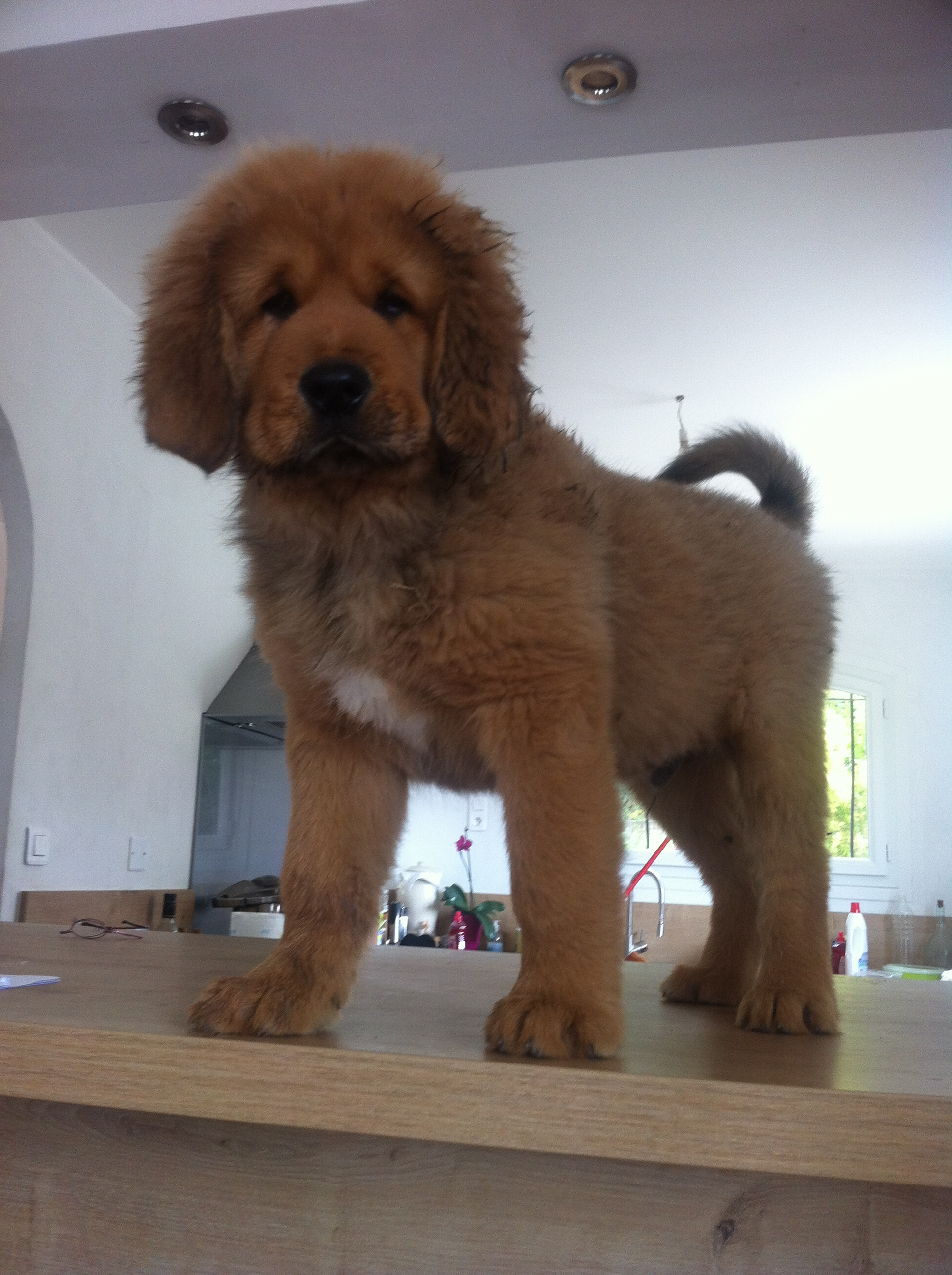 CHIOT DOGUE DU TIBET LION DU TIBET